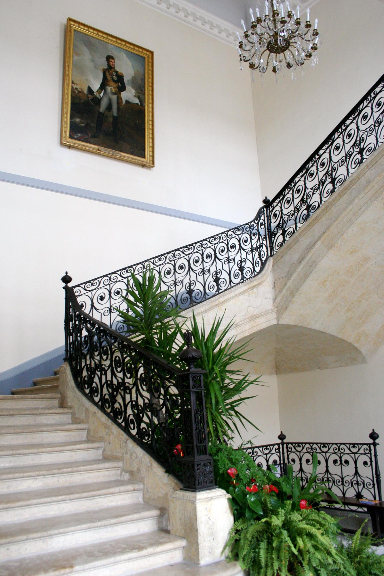 Hôtel de ville de Lectoure (Gers, France), escalier, garde-fou rampant en fer forgé XVIIIe, portrait du maréchal Lannes